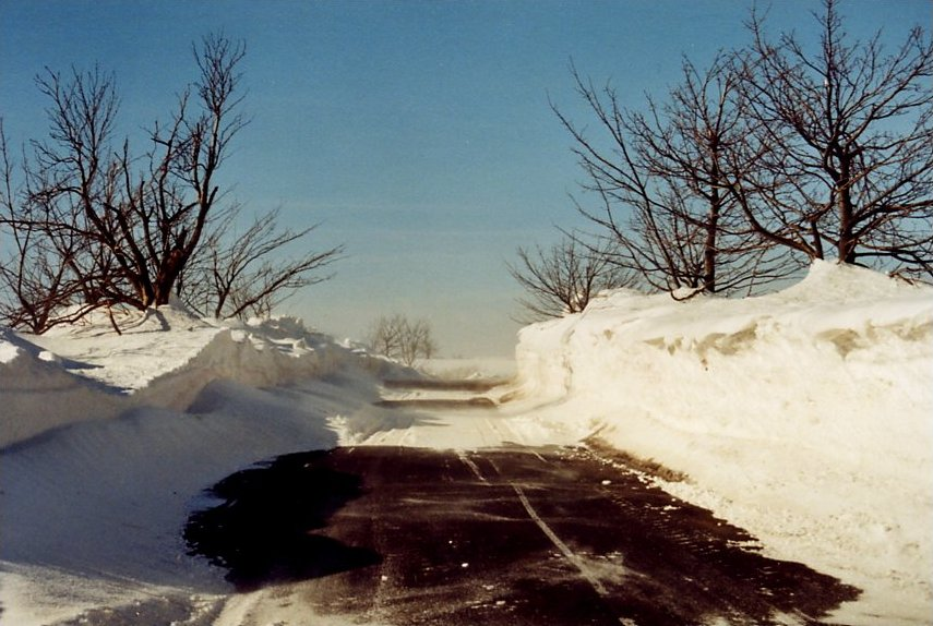 Zima v Nakléřovském průsmyku, silnice Petrovice - Krásný Les.